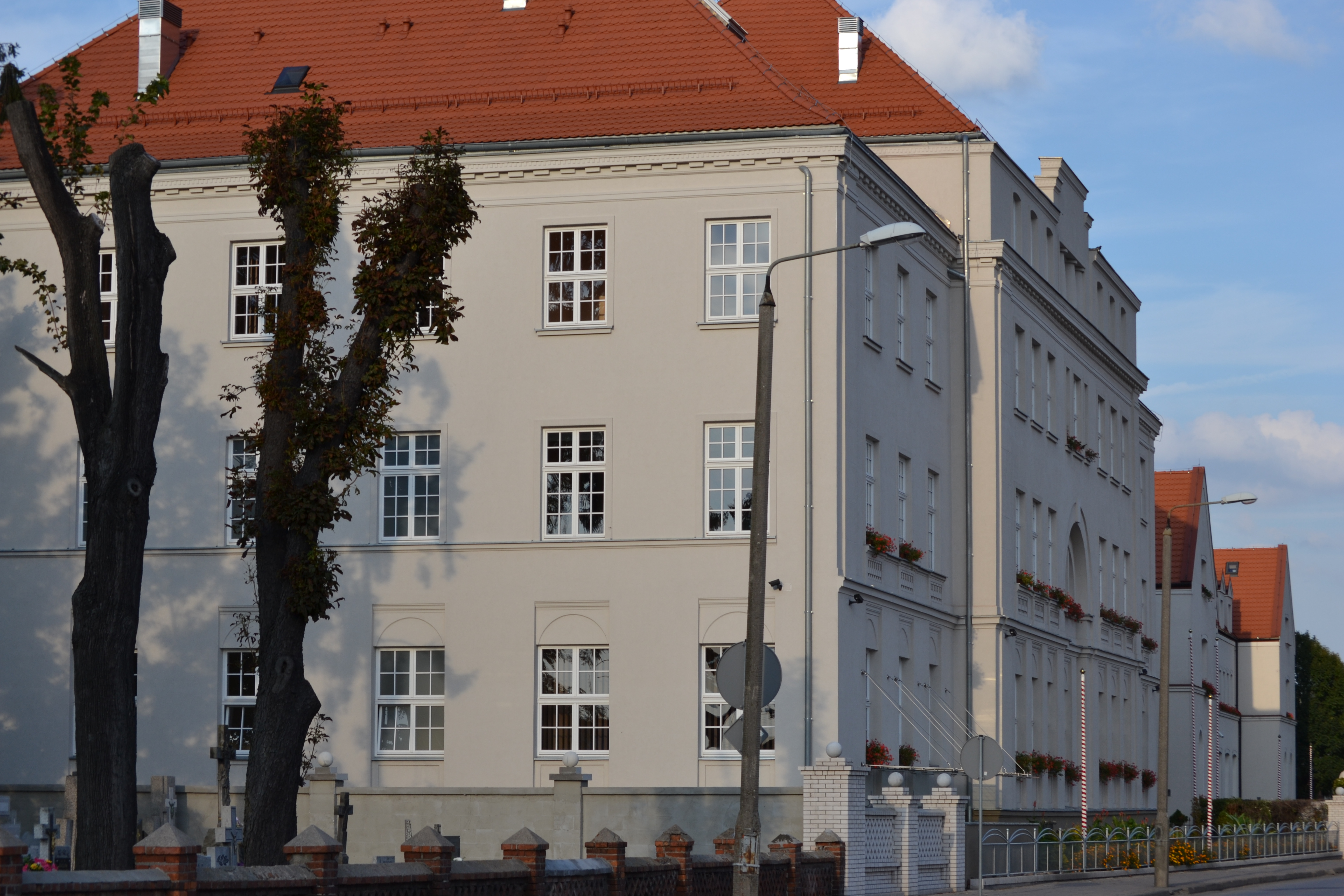 Kolegium Kujawskie znajdujące się przy ul. Chopina w Aleksandrowie Kujawskim